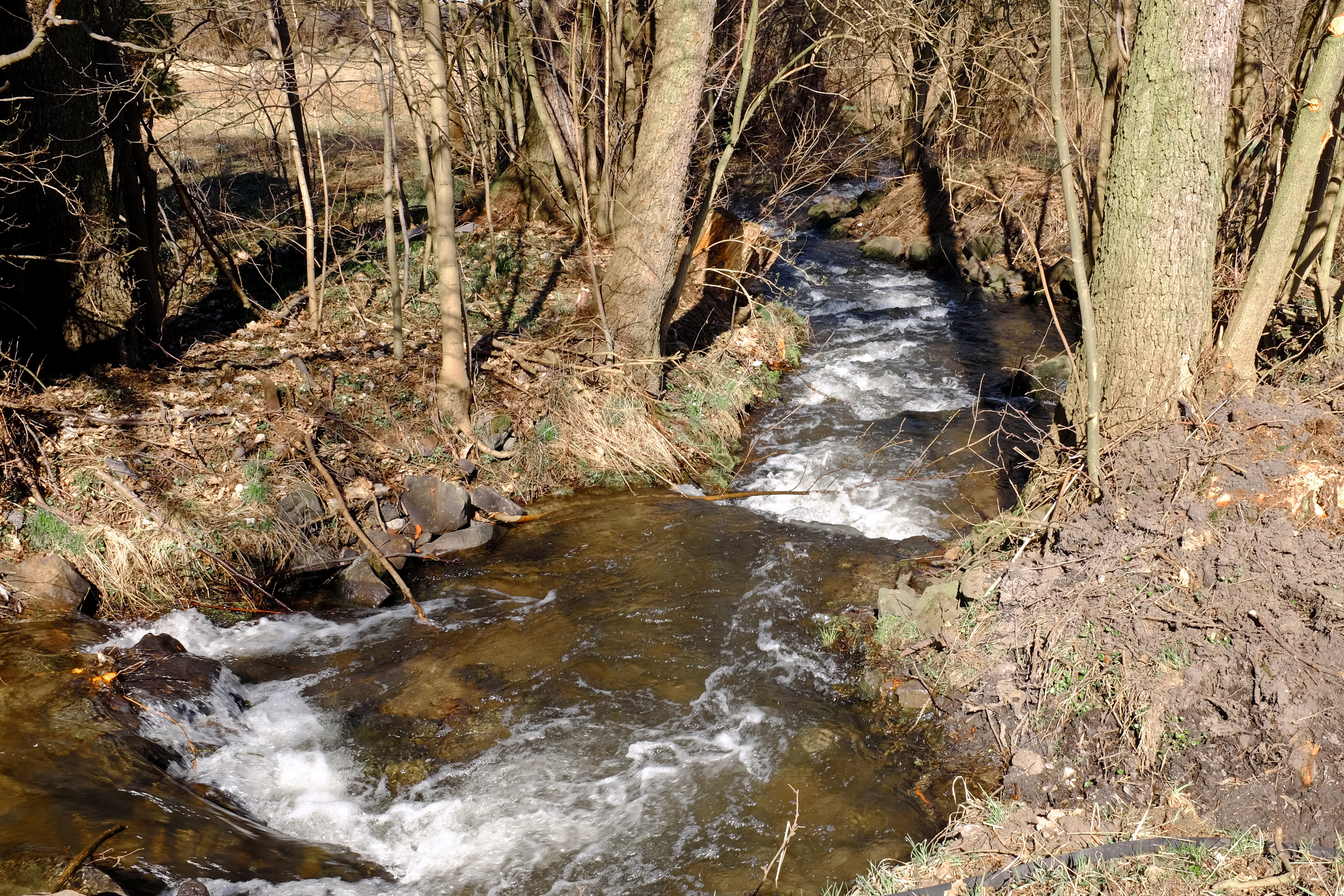 Plavenský potok v Damicích, okres Karlovy Vary